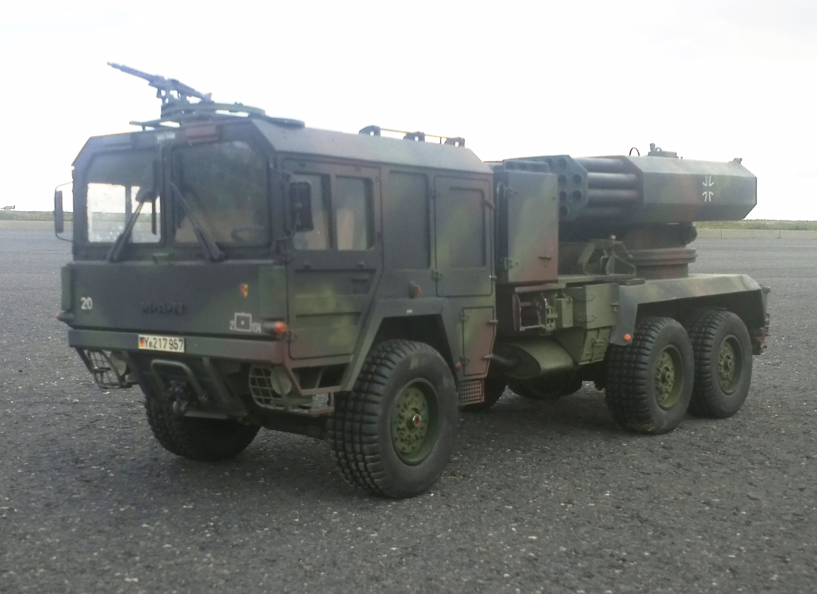 Seitenansicht rechts